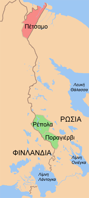 Map highlighting Petsamo, Repola and Porajärvi